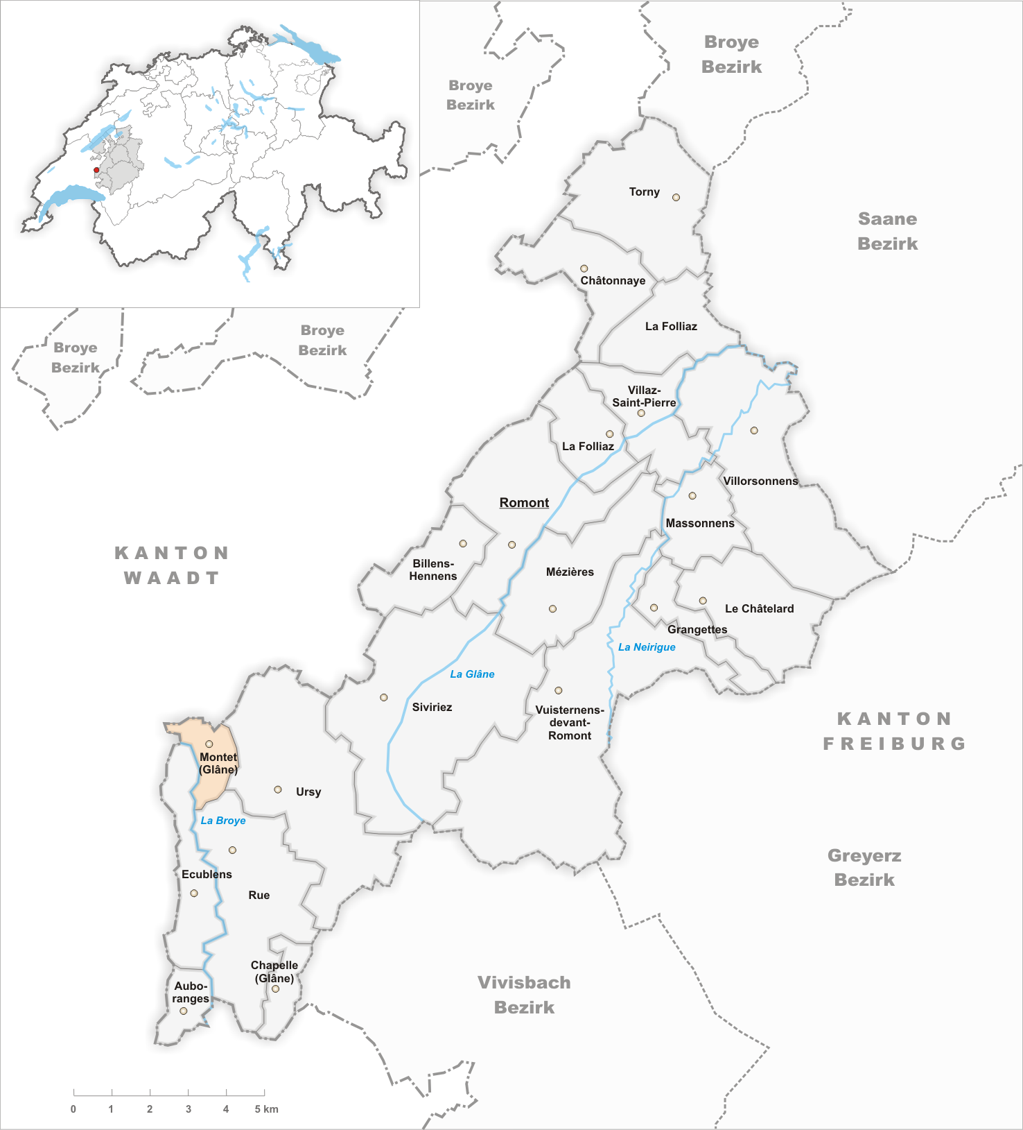 Municipality Montet (Glâne)